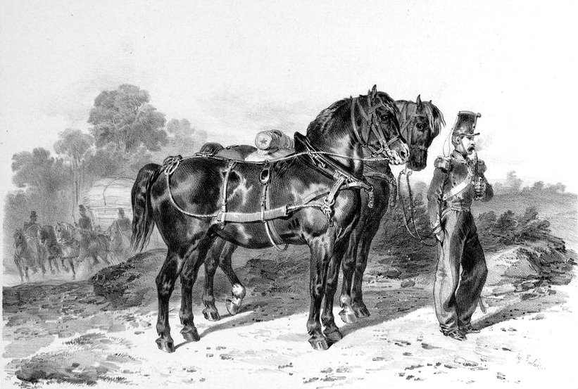 Race ardennaise (vers 1850)